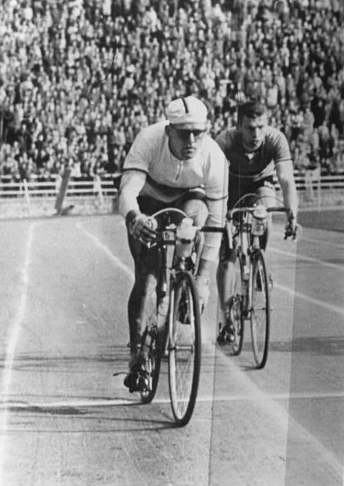 Gustav-Adolf Schur, Vandenberghen Zentralbild Wendorf 2.5.1960 Telefoto - XIII. Friedensfahrt 1960 - 1. Etappe Prag-Brno. UBz: Zielbild: Schur (DDR) siegt vor Vandenberghen (Belgien).